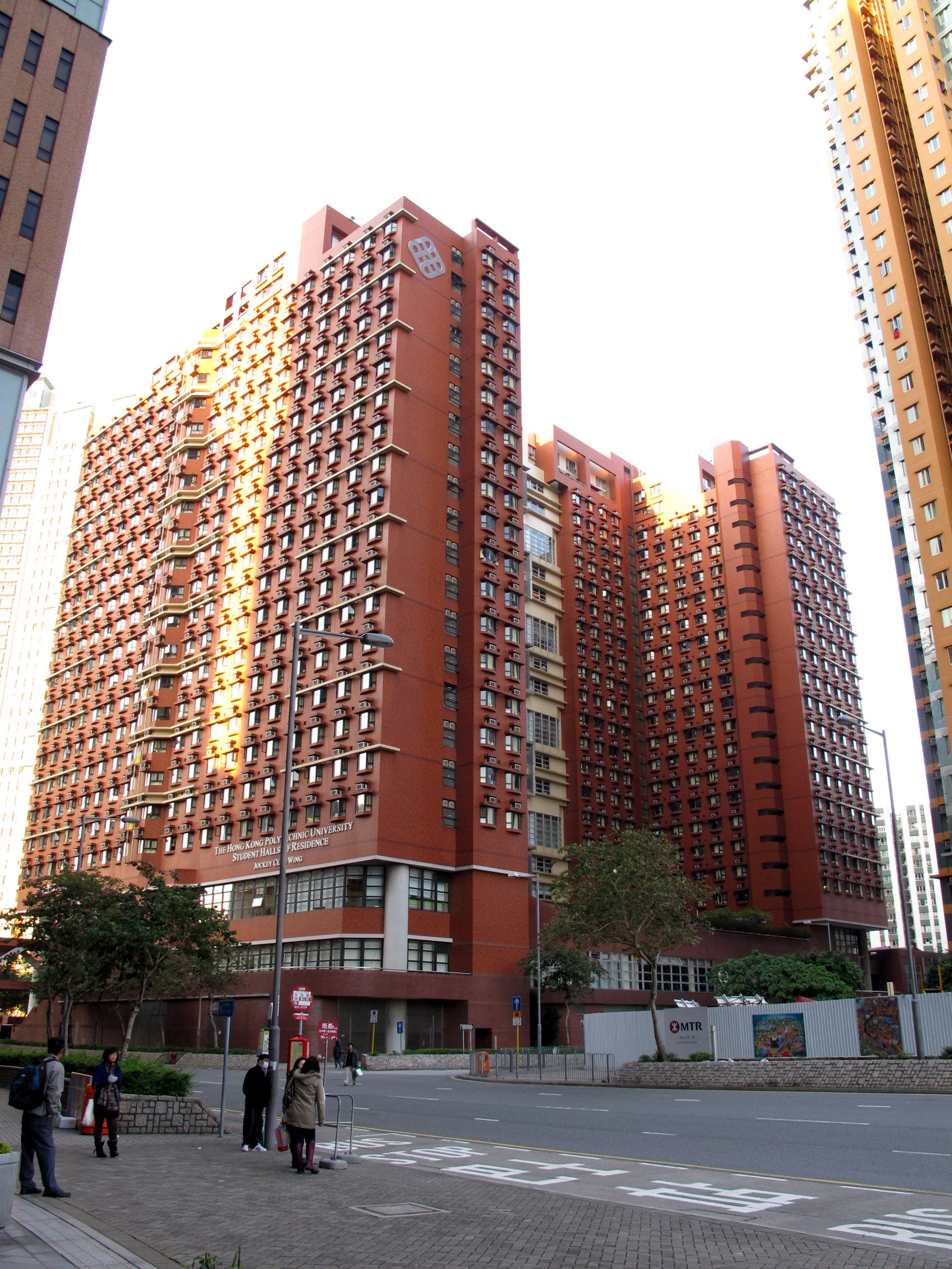 Hong Kong PolyU Student Hostel Sir Gordon Wu